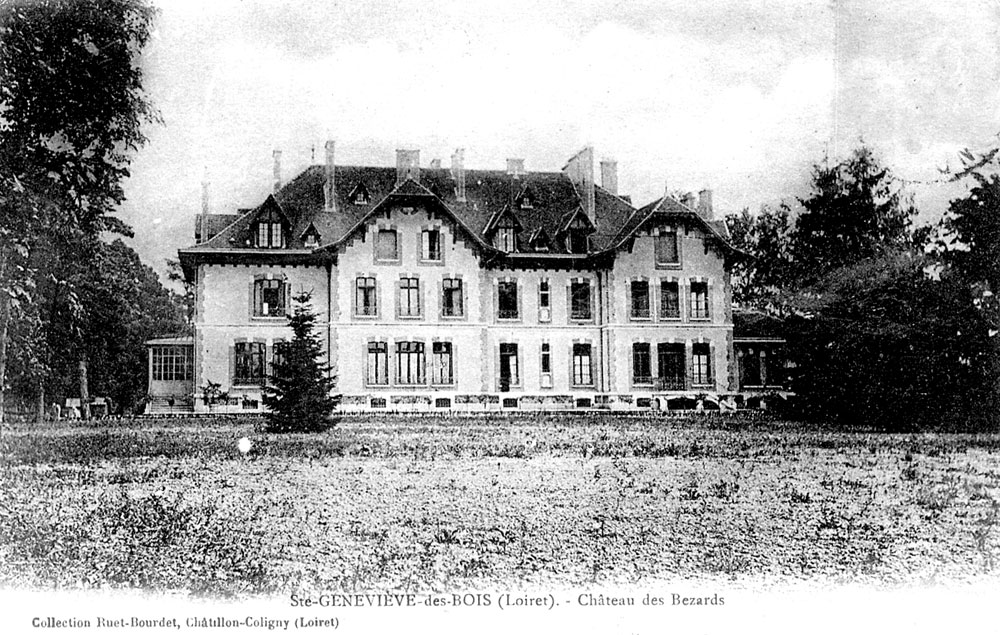 Château des Bezards, Sainte-Geneviève-des-Bois, Loiret, France